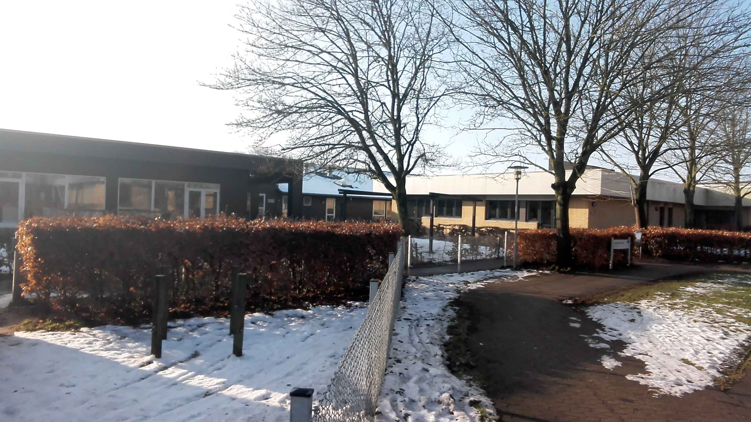 Børnehuset Broen i Vamdrup